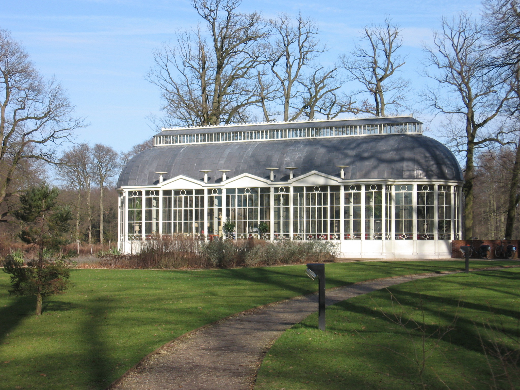 Barneveld